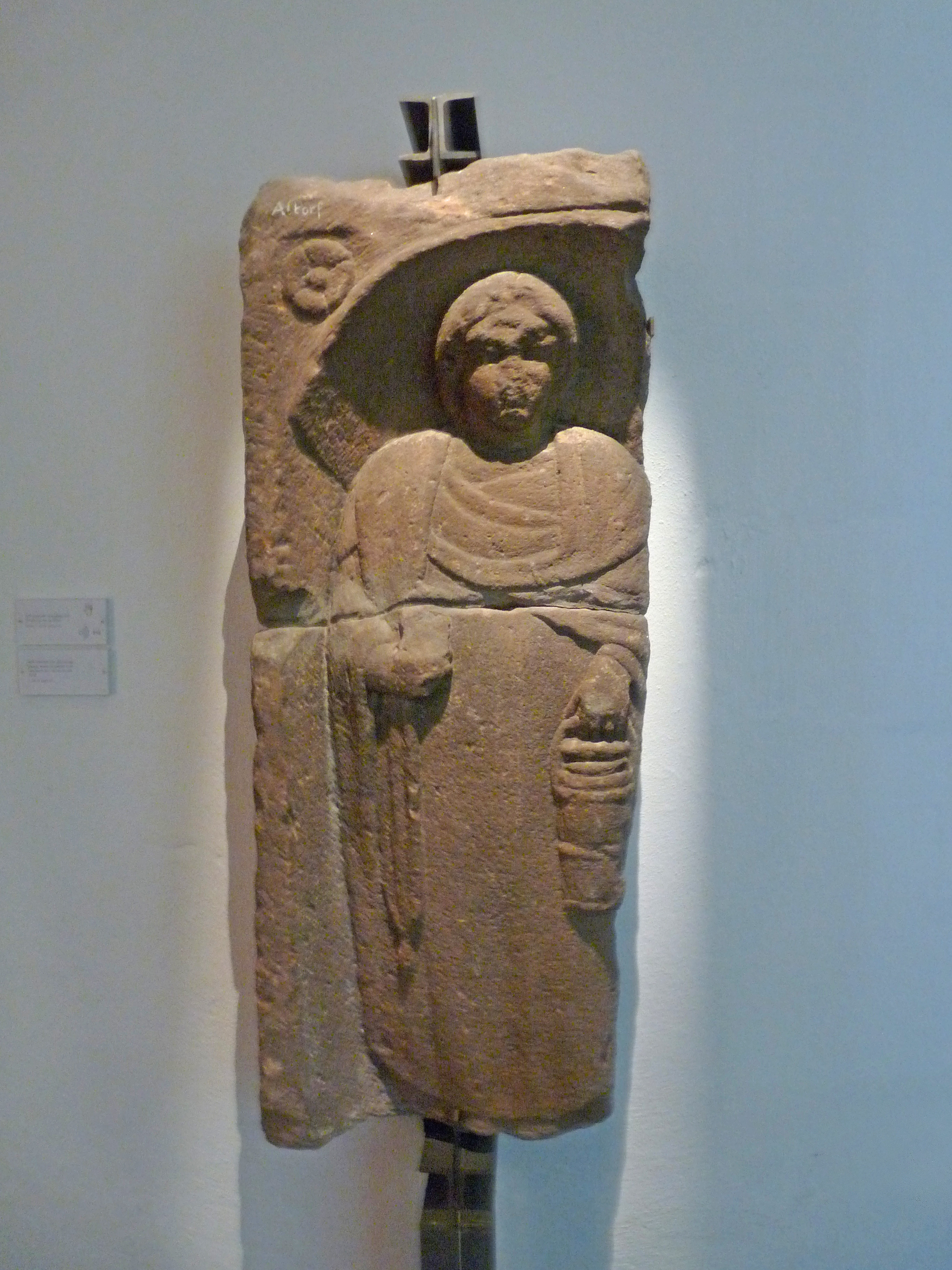 Stèle funéraire avec un personnage féminin tenant un gobelet et un vase placé dans un étui en cuir. 3e siècle après JC. Trouvé à Altorf. Musée archéologique de Strasbourg